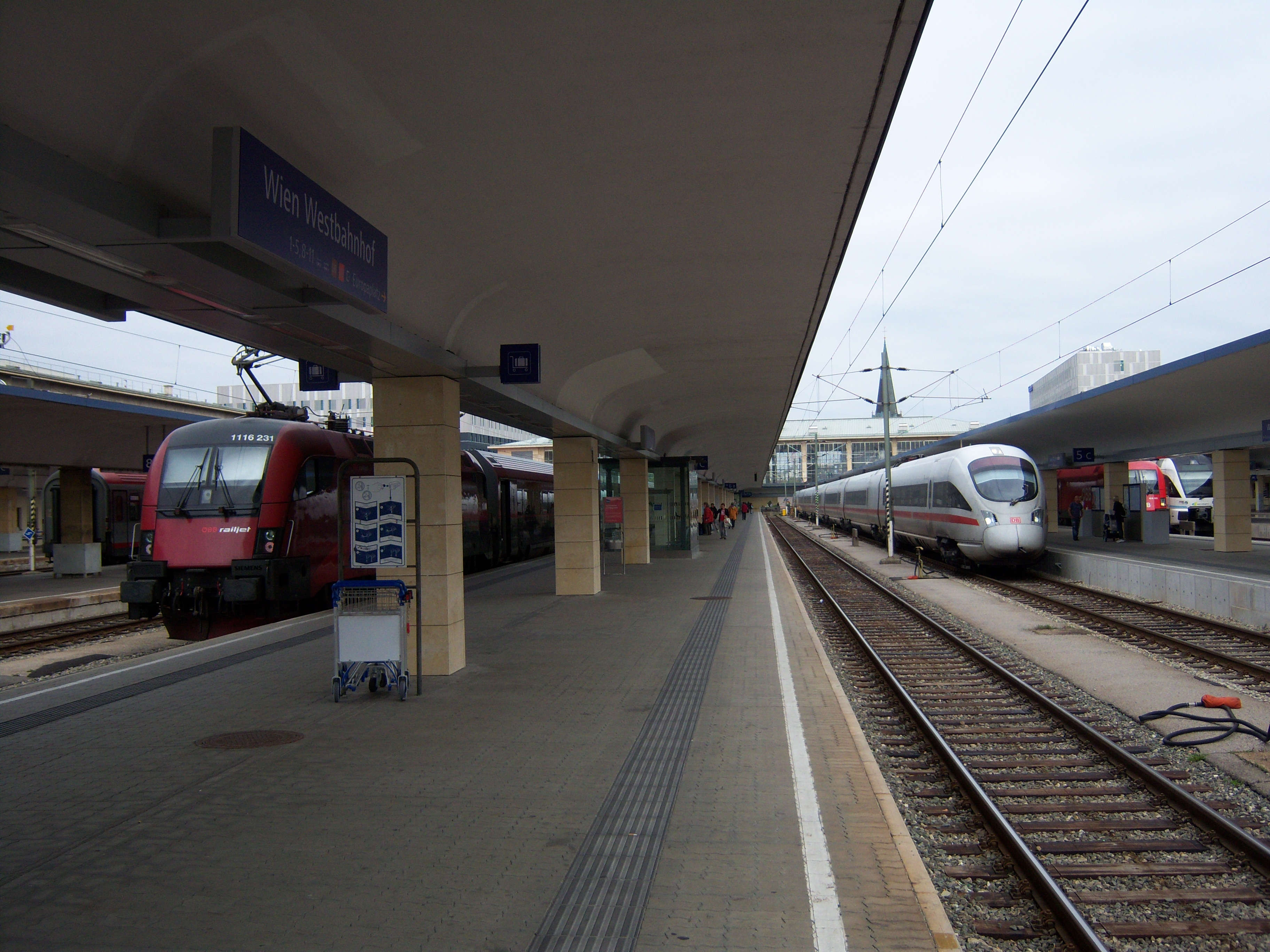 Bahnsteige am Wiener Westbahnhof, Blickrichtung Osten; Links steht ein Railjet nach München, Rechts in ICE nach Dortmund